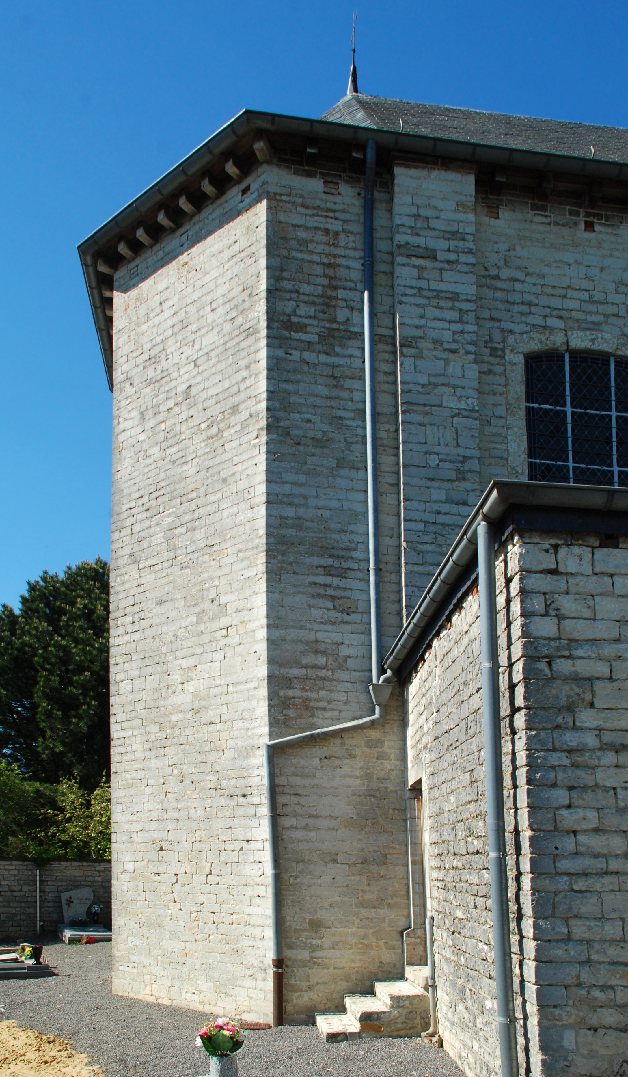 Belgique - Brabant wallon - Jodoigne - Saint-Remy-Geest - Église Saint-Remy